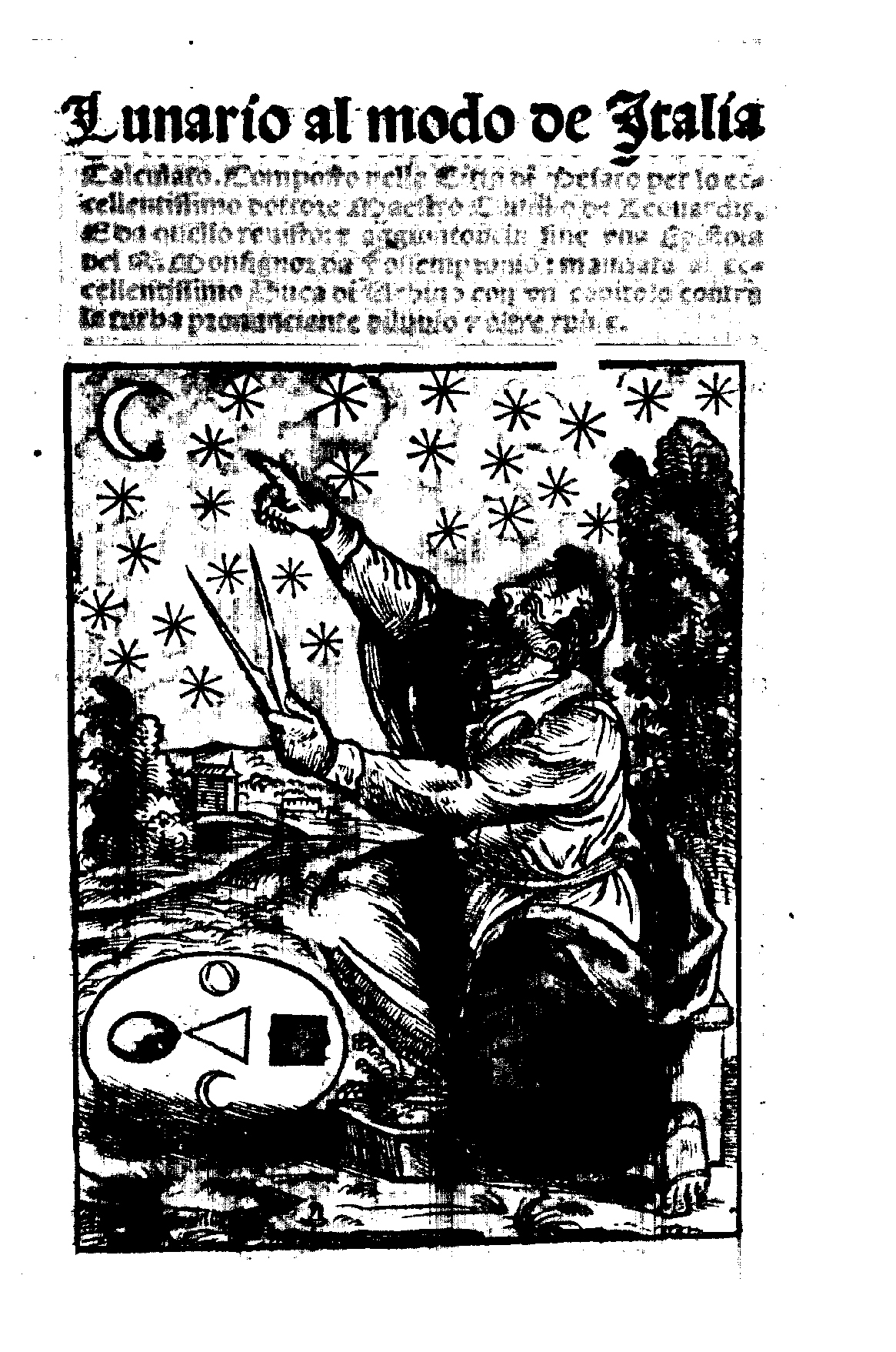 Lunario al modo de Italia calculato. Composto nella citta de Pesaro per lo excellentissimo doctore maestro Camillo de Leonardis. E da quello reuisto. E aggiontoui in fine vna Epistola ... con vn capitolo contra la turba pronunciante diluuio & altre ruine. & c. - [S.l. : s.n., s.d.] (Stampato in Vinegia per Nicolo Zopino nel anno del signore 1525. del mese di Settembre). - [24] c. ; 8º .